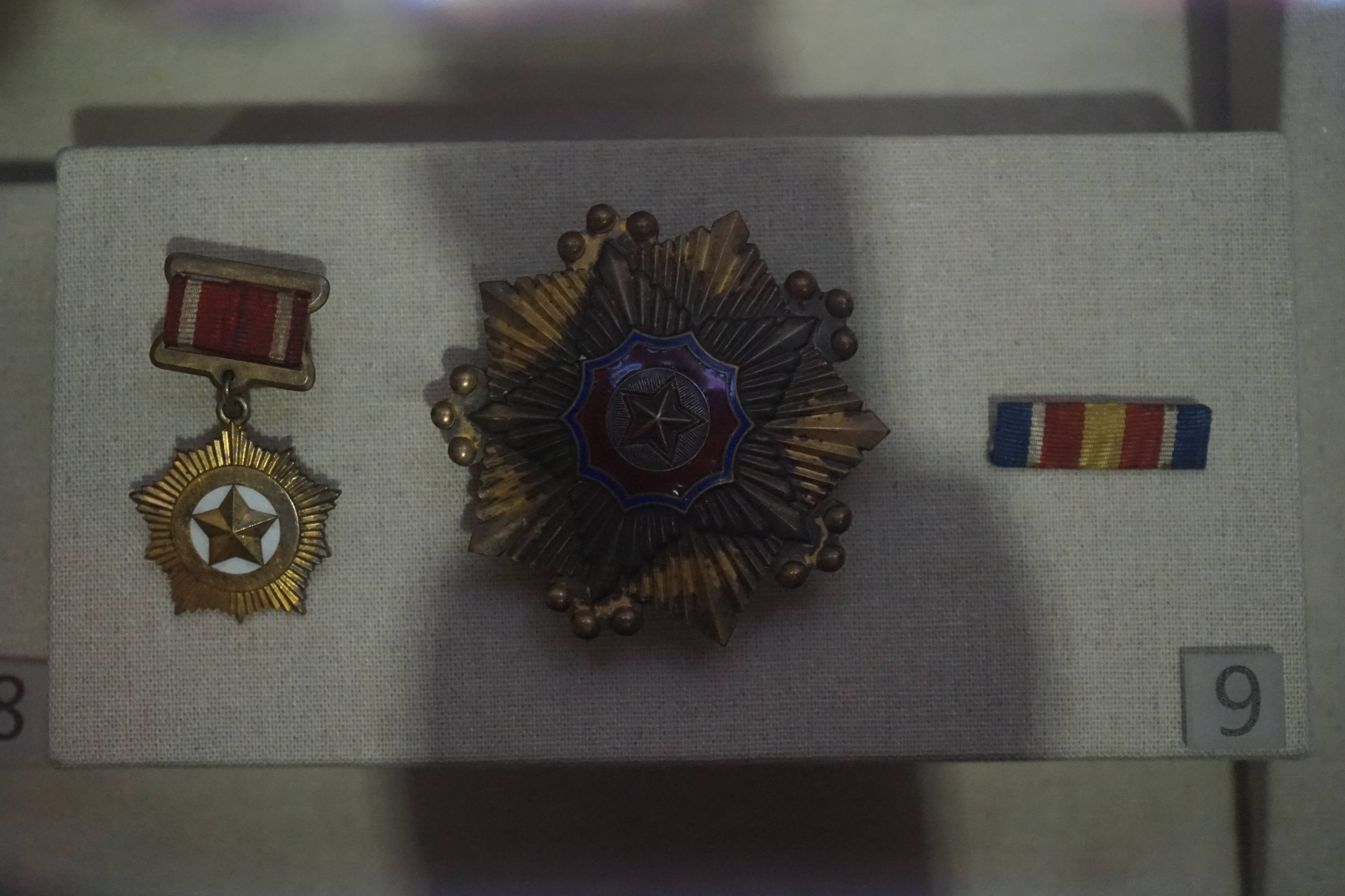 朝鲜最高人民会议常任委员会授予胡修道的一级国旗勋章、金星奖章。一级文物。胡修道1952年11月在上甘岭战役中和班长等3人坚守587.9高迪3号阵地，打退敌人40余次进攻，创造了奇迹